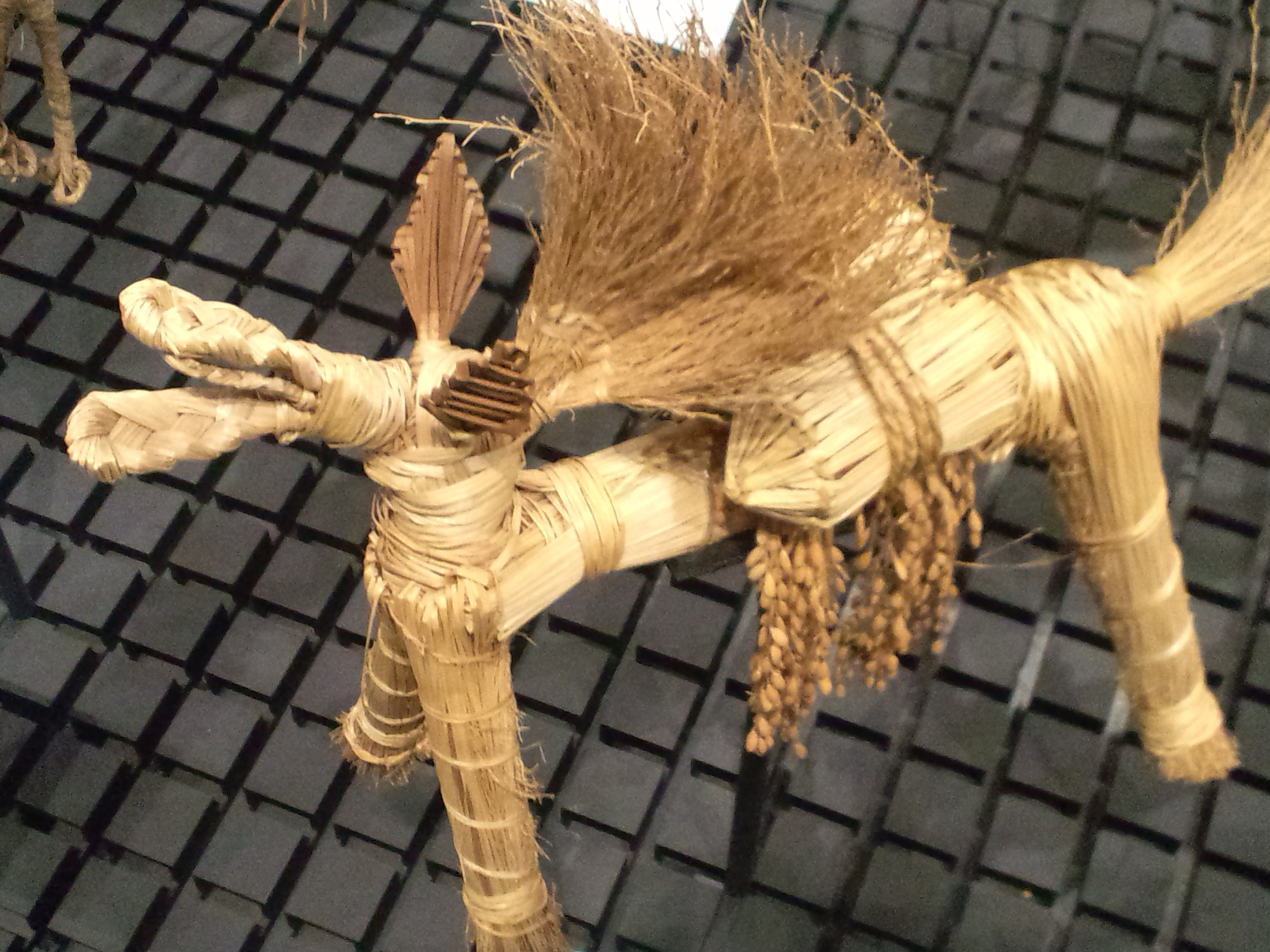 国立民族学博物館（大阪） 道祖神祭のウマ（鳥取県、大山町、1978年製作）